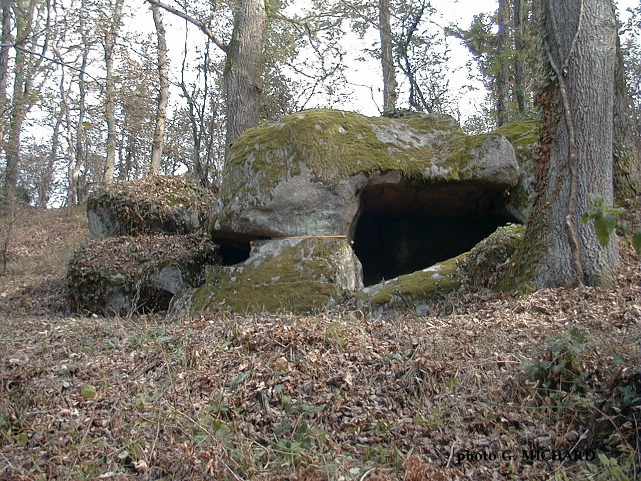 La Cabane du Loup, dolmen à couloir à usage funéraire, situé à une dizaine de mètres de la rivière l'Oeil